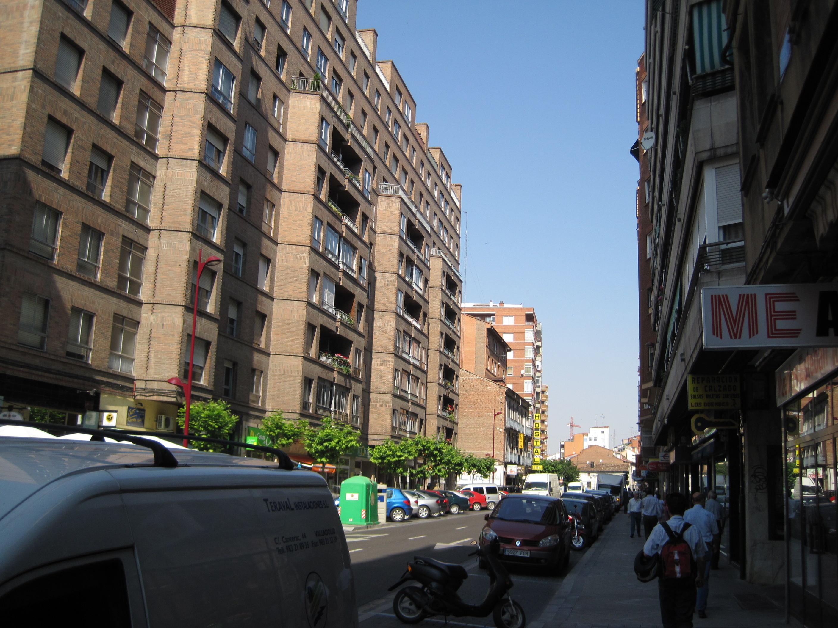 Vista parcial de la calle Tudela, en el barrio de La Circular (Valladolid, España).